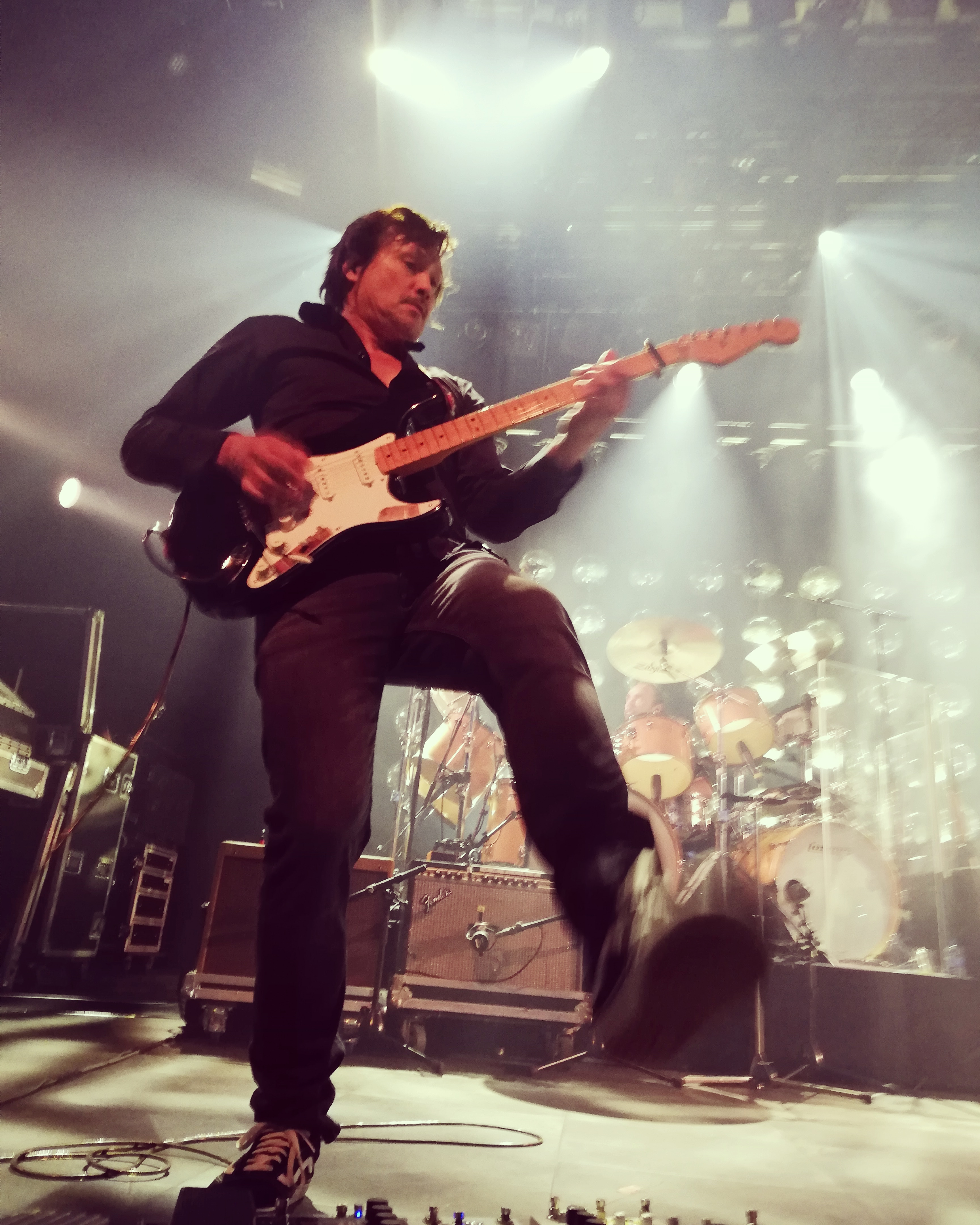 Optreden met Ilse Delange in Nijmegen